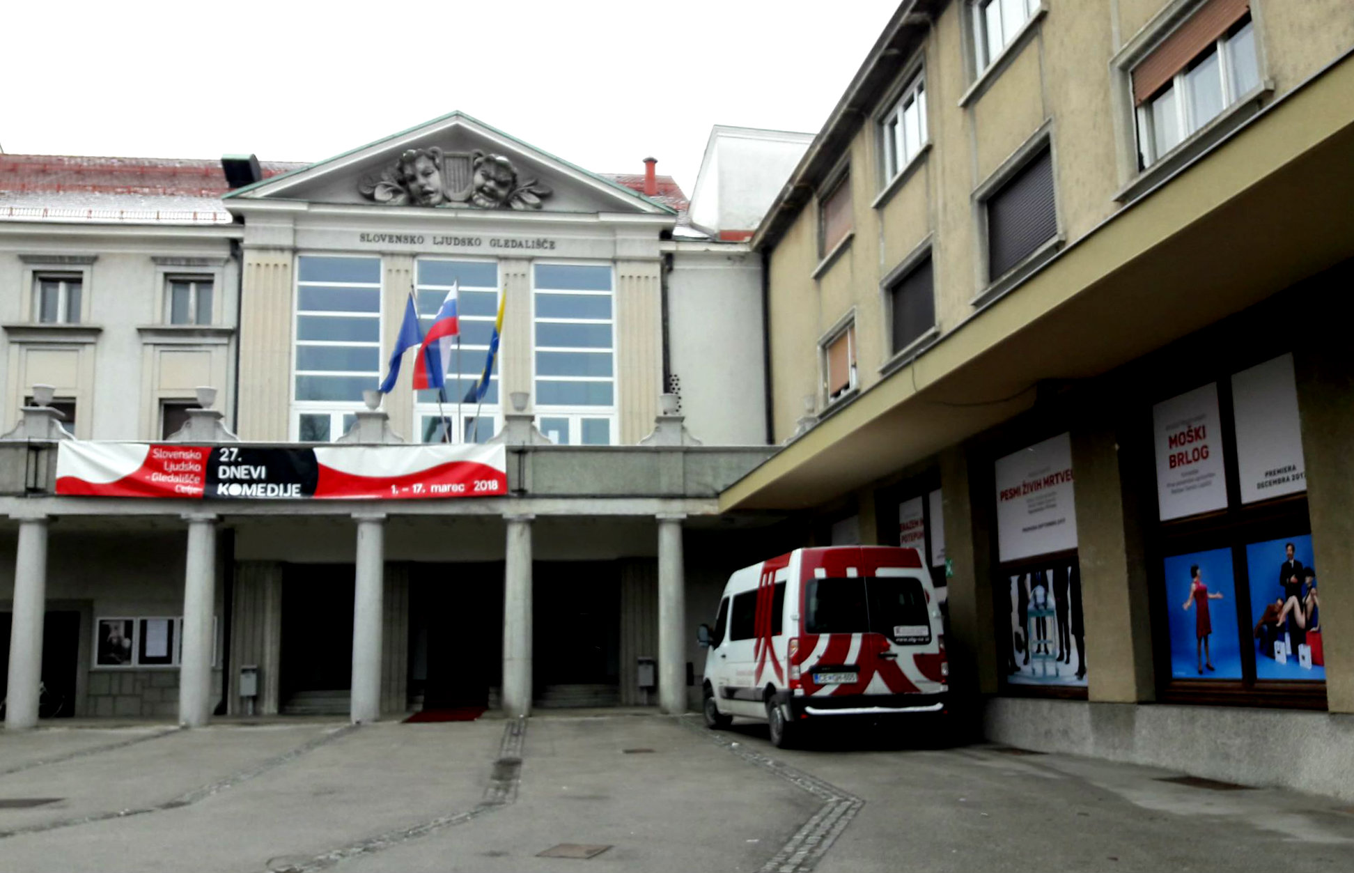 Pročelje SLG Celje